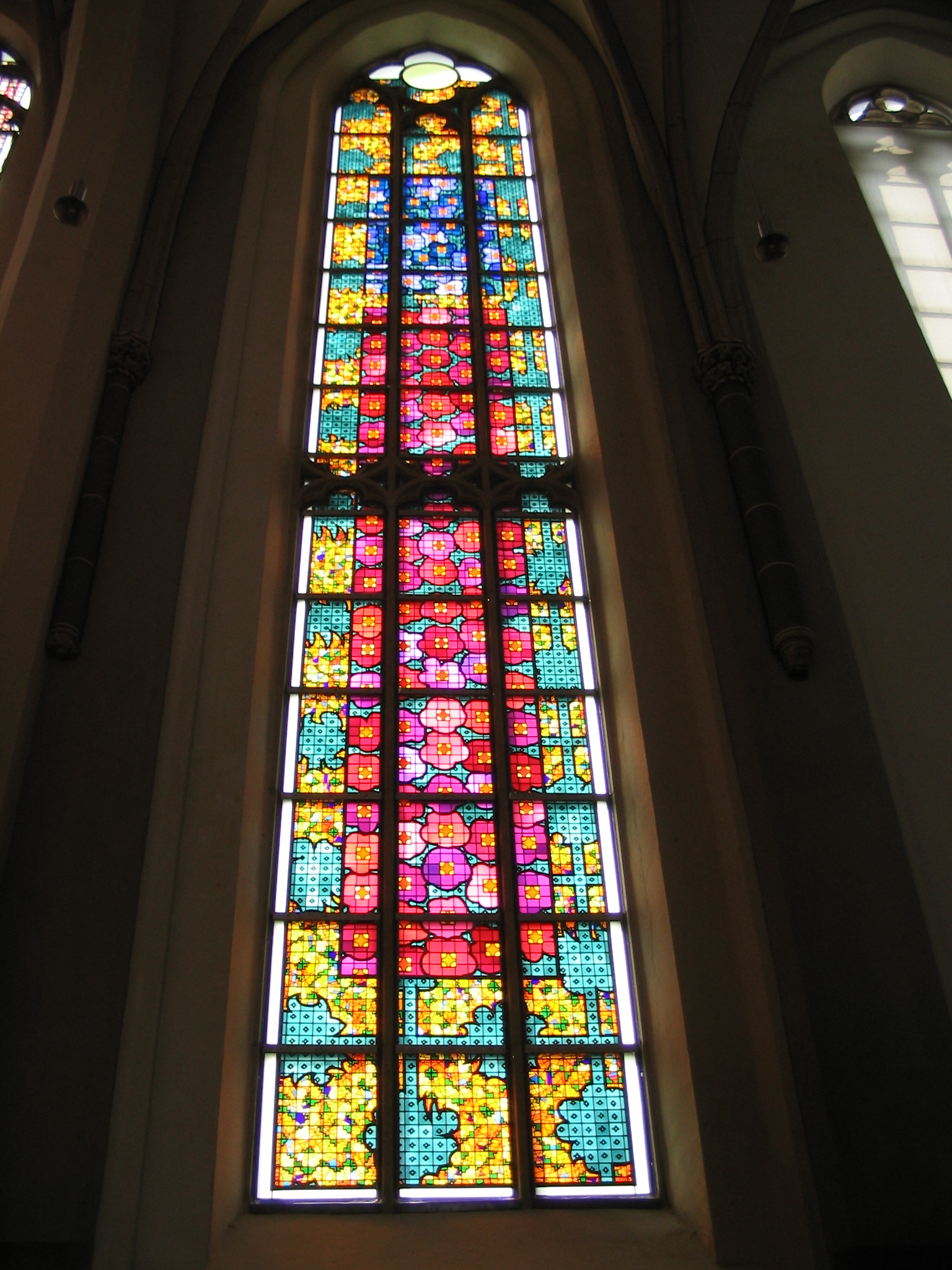 Bleiglasfenster in St. Nicolai, Kalkar, Ausführung: Glasmalerei Derix (Taunusstein)